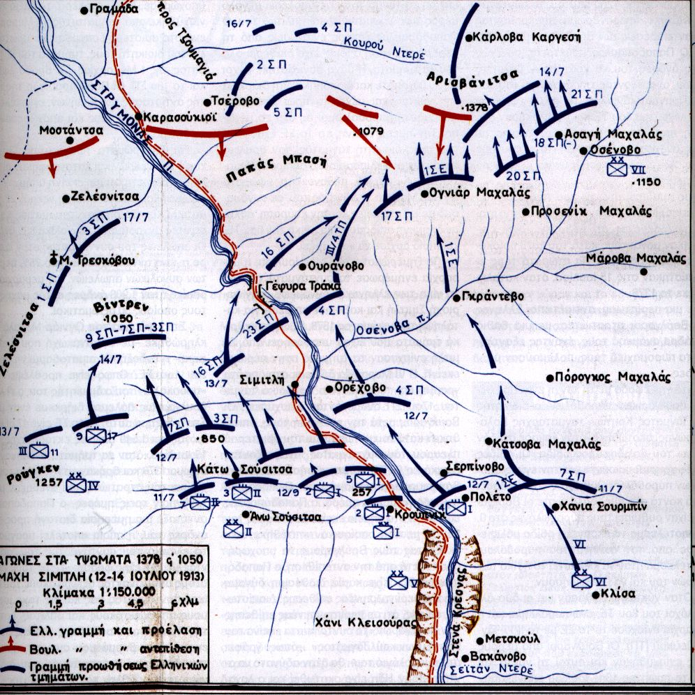 Movements during the Battle of Kresna Gorge (1913). Advance of the Greek Army after breaking through the Kresna (south part of the map)